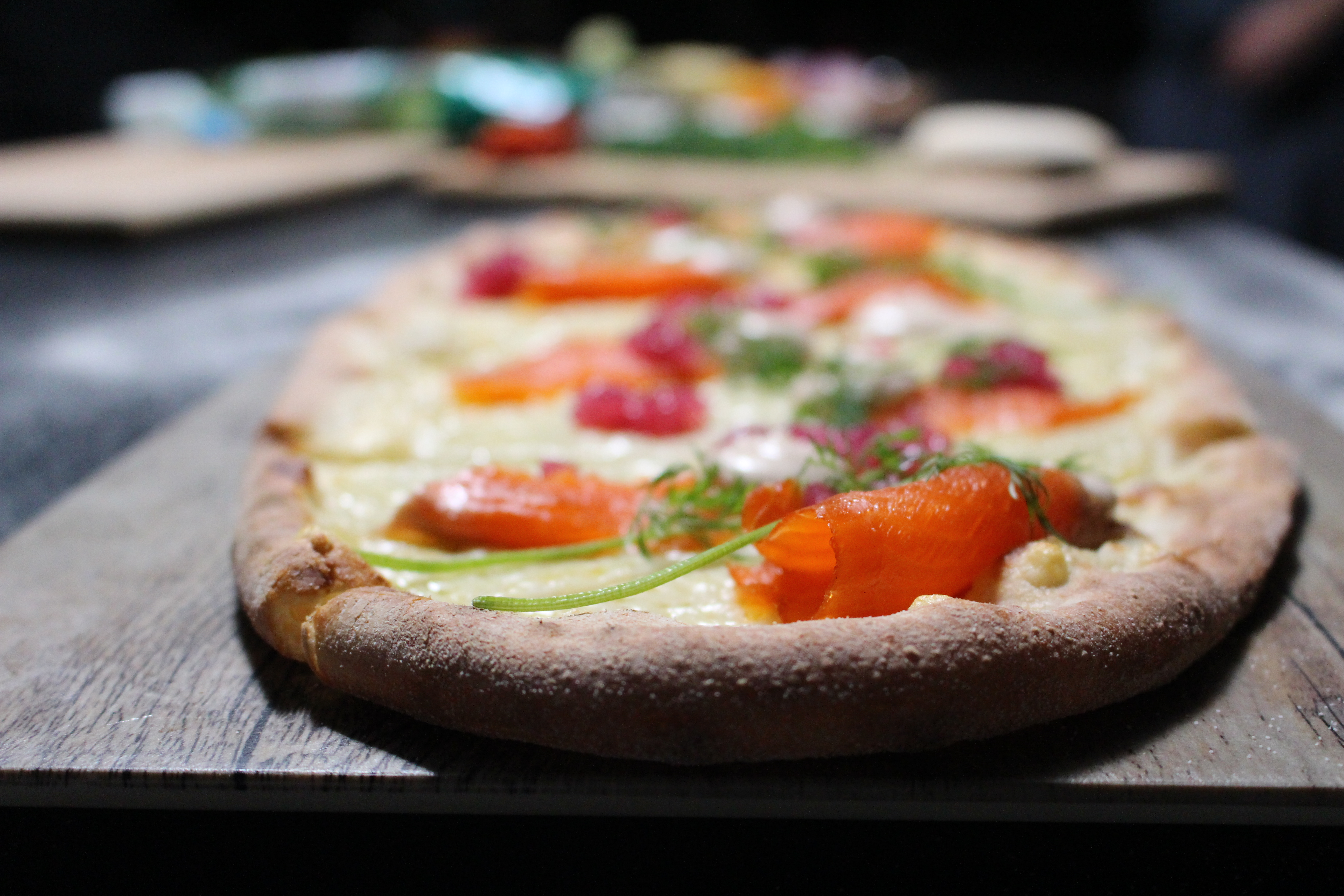 Lohilankku tuli markkinoille vuoden 2018 alussa.